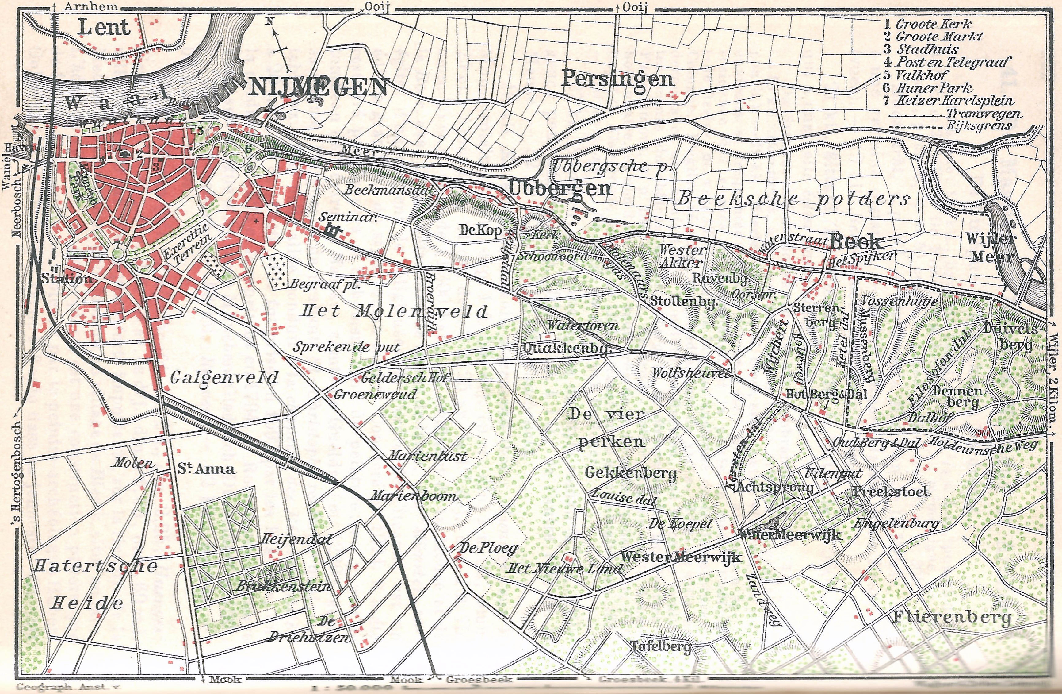 Kaart van Nijmegen en omgeving uit 1905. Er zijn twee tramlijnen te zien.